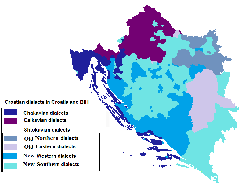 Hrvatski dijalekti u RH i BiH. Štokavski su prikazani svi (novoštokavska ekavica u Slavoniji je prikazana kao dio slavonskog radi ikavske osnovice). Kajkavski i čakavski dijalekti su prikazani kao grupe.